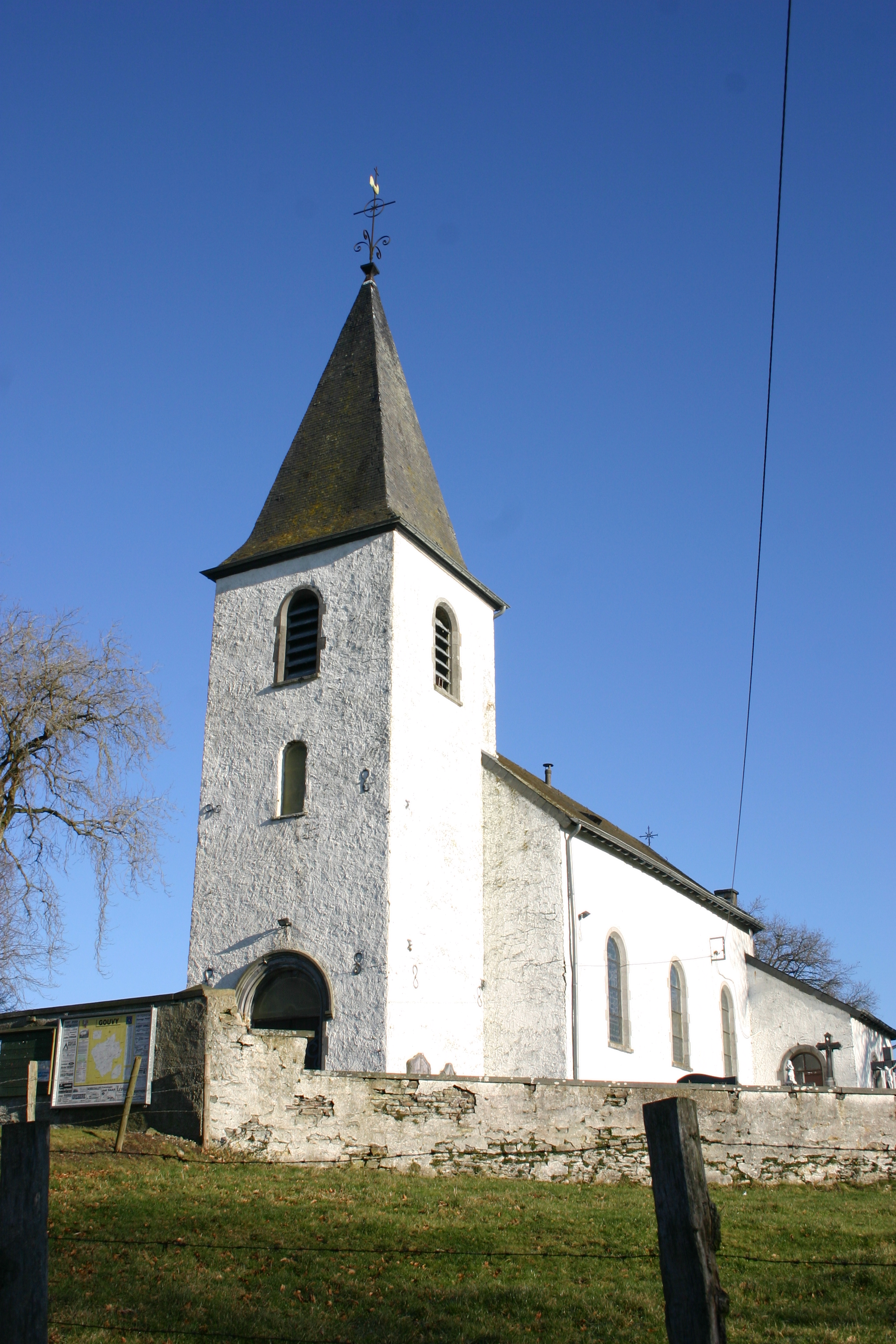 D'Kapell Saint Lambert zu Deiffelt.